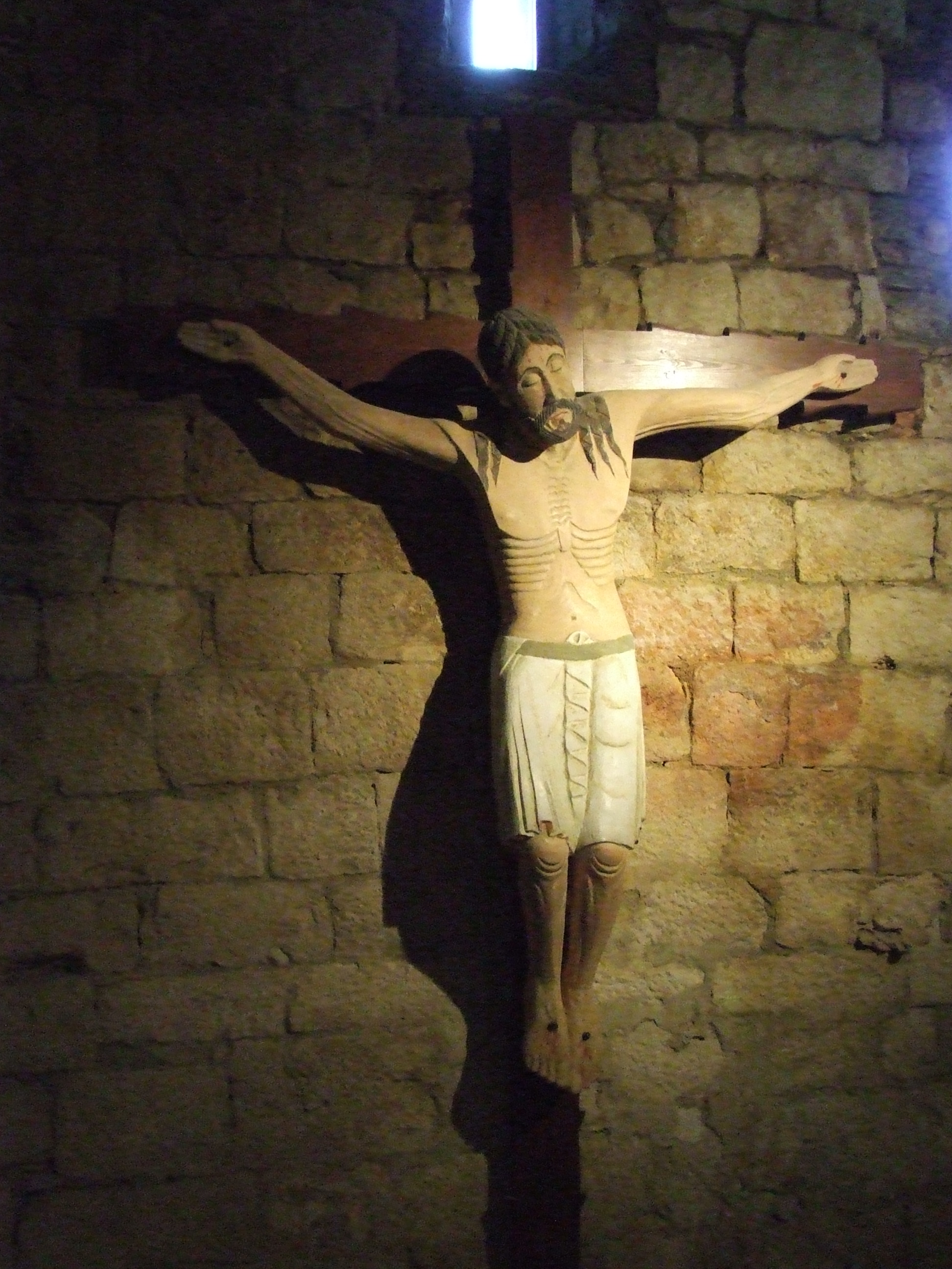 Imatge reconstruïda del Sant Crist de Mur (Castell de Mur, Pallars Jussà)